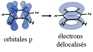 orbitales p du carbone dans le benzène et électrons délocalisés. version française du fichier de commons.